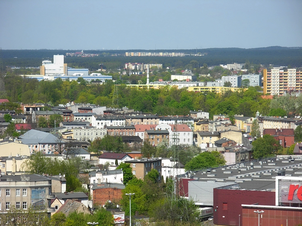 Widok z wieży ciśnień w Bydgoszczy w kierunku północno-zachodnim (Osowa Góra)